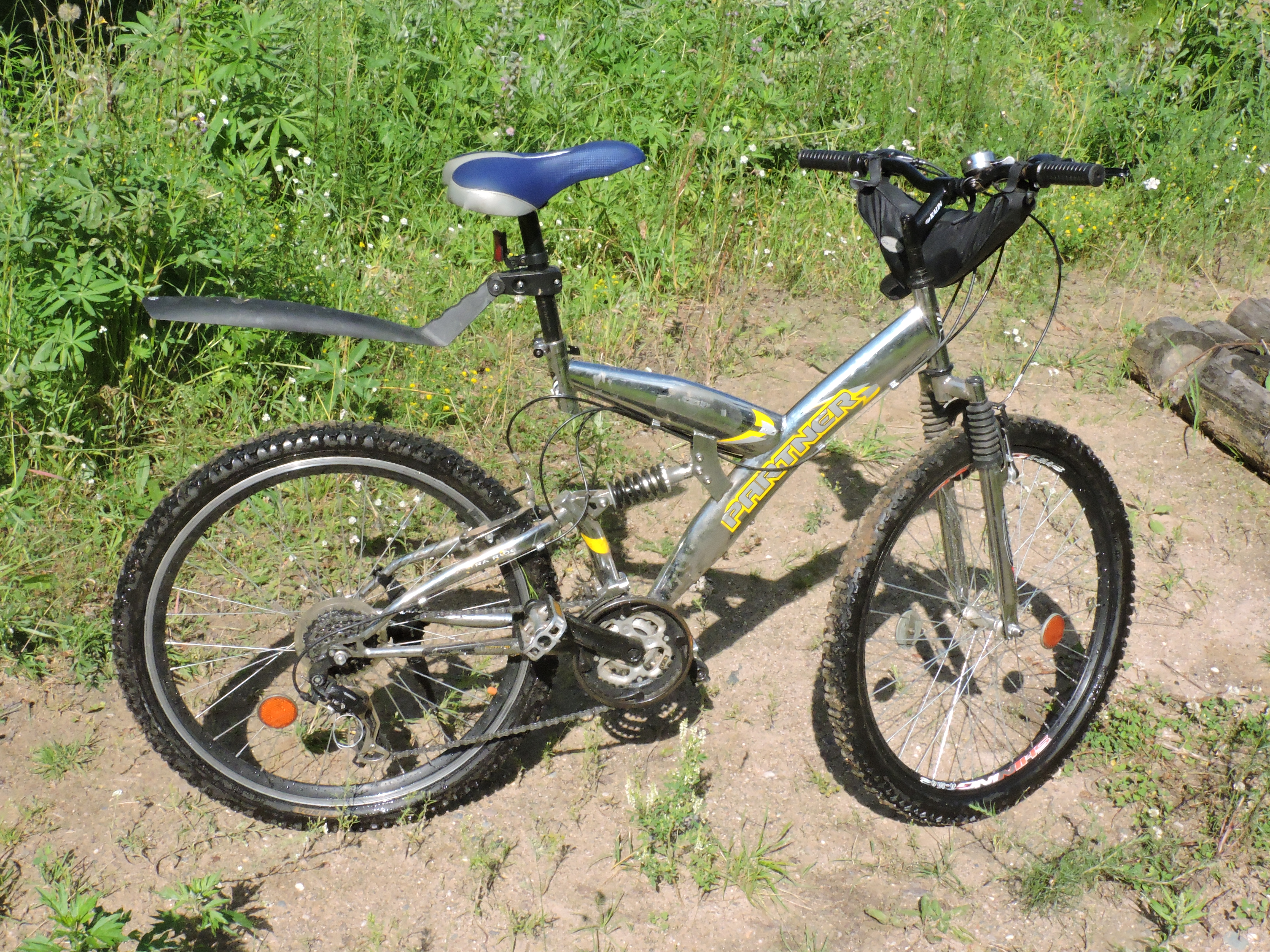 Велосипед-двухподвес «Partner-703»